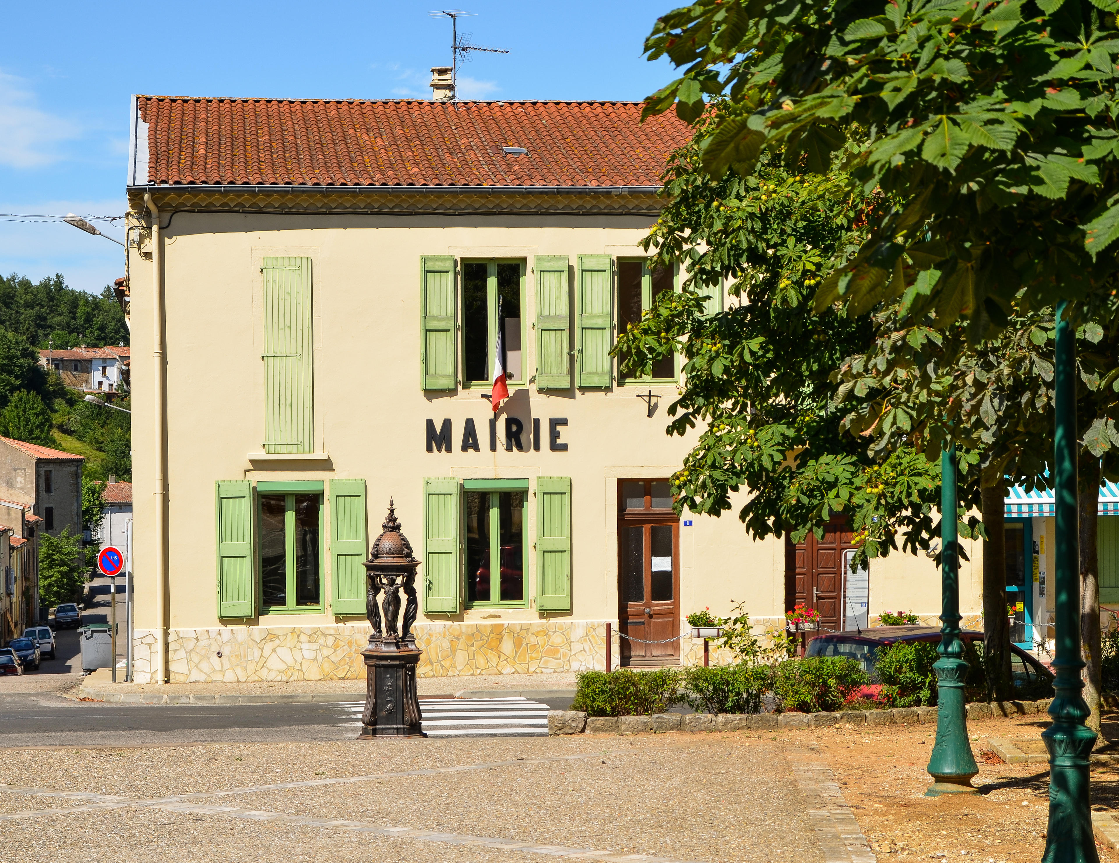 Mairie et colonne Wallace à Sainte-Colombe sur l'Hers (Aude)